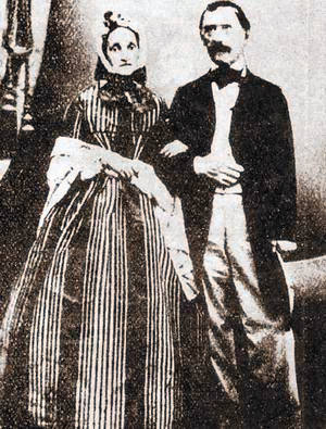 Ředitel dačické rafinérie cukru Jakub Kryštof Rad se svou chotí Julianou.